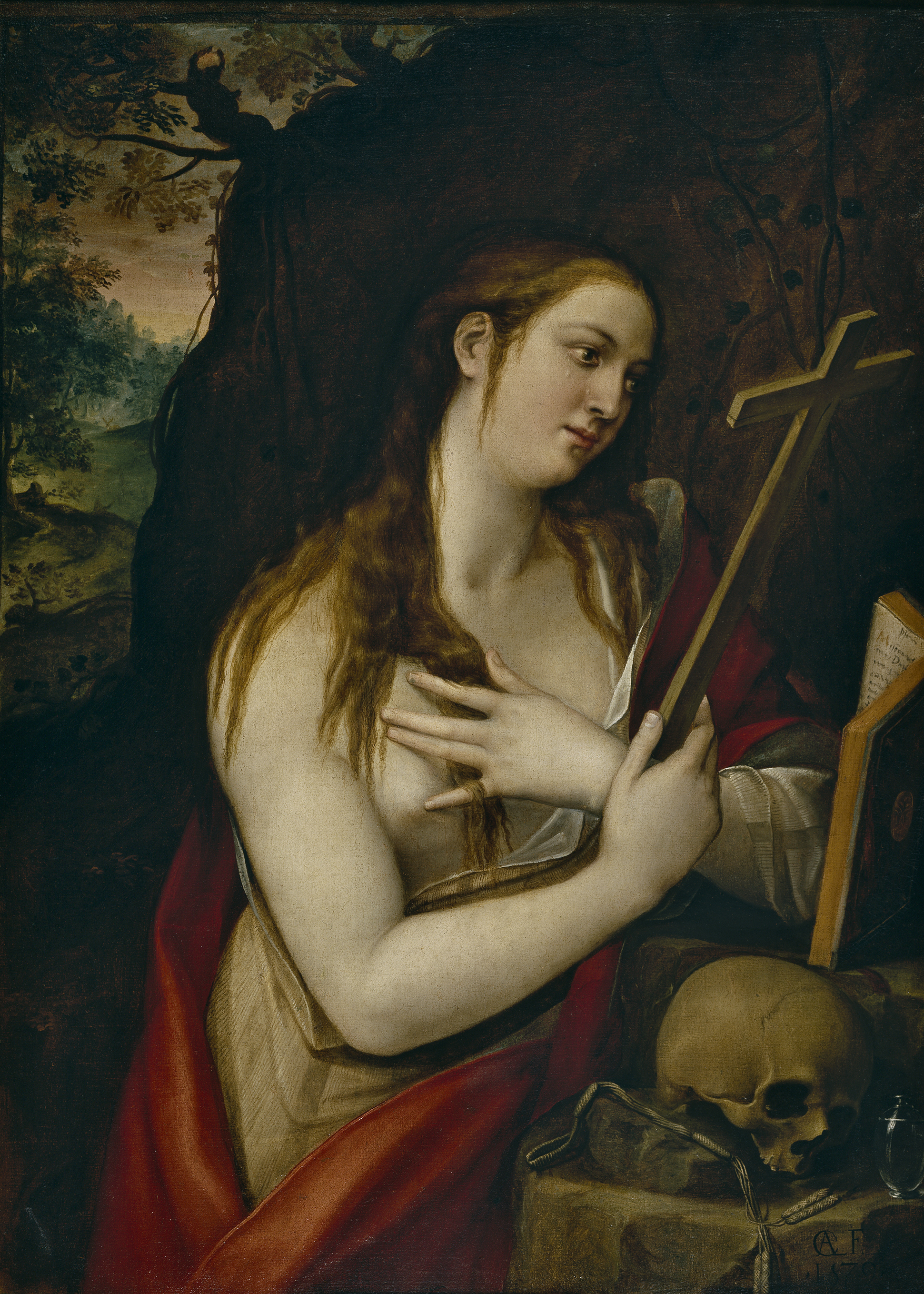 La obra representa a Santa María Magdalena haciendo penitencia por sus pecados.